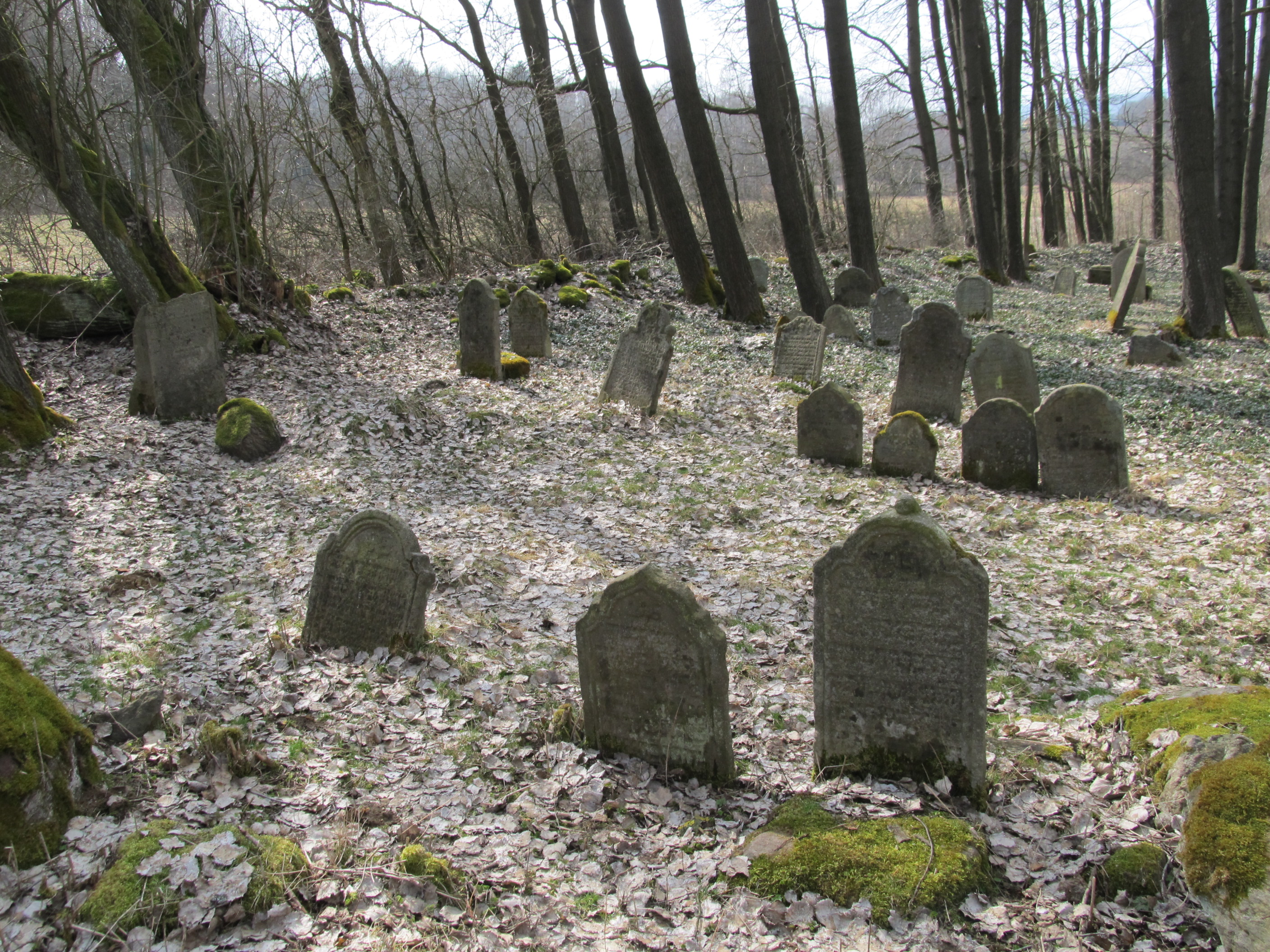 Pořejov ŽH 03